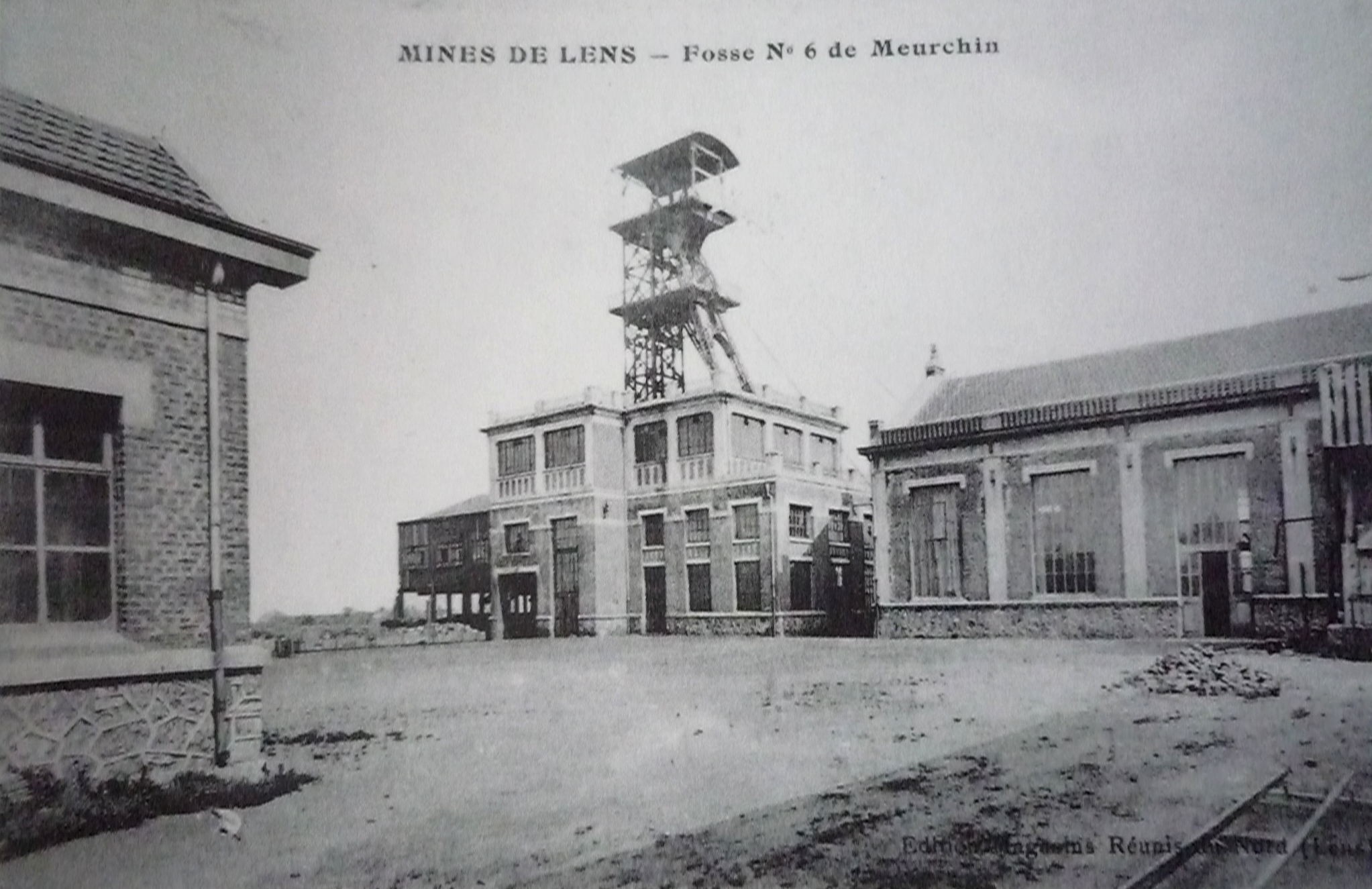 La Fosse n° 6 de la Compagnie des mines de Meurchin était un charbonnage constitué d'un seul puits situé à Carvin, Pas-de-Calais, Nord-Pas-de-Calais, France.